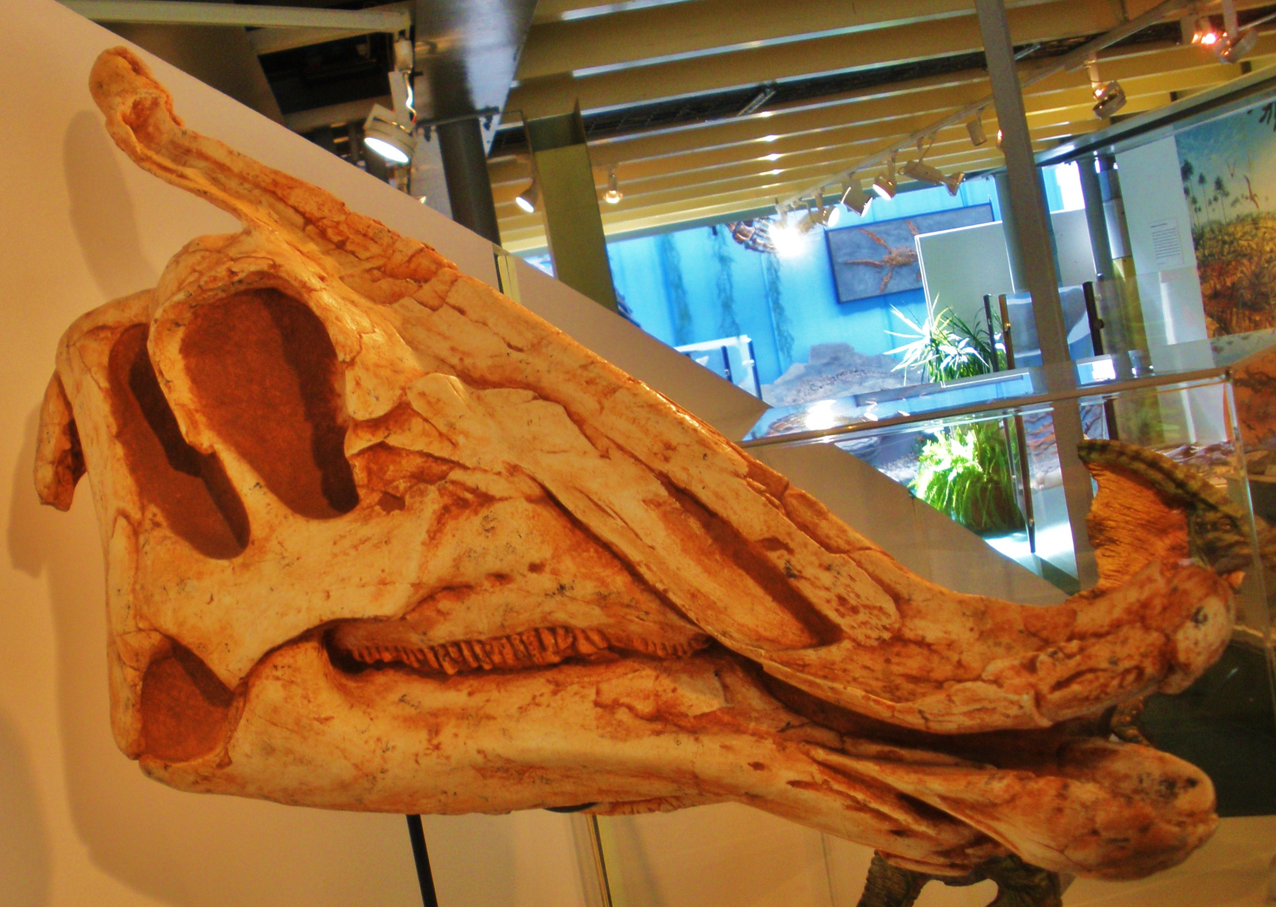 fossil SaurolophusF